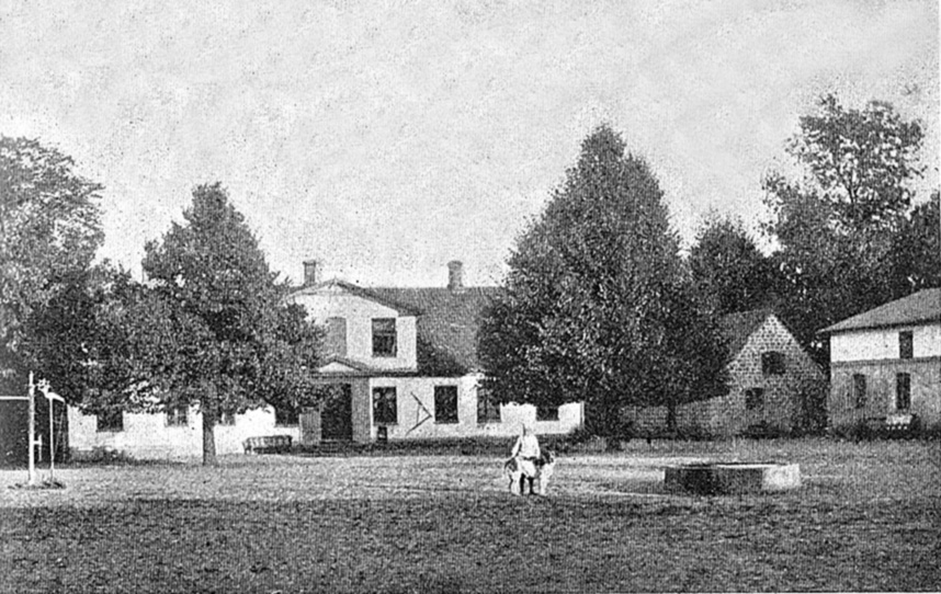 Koldkærgård ligger i Kasted Sogn, Hasle Herred, Århus Kommune. Koldkærgård blev i middelalderen, af biskop Peder Vognsen, skænket til domkapitlet i Århus; senere kom gården til Christian Bielke, der også var ejer af Kærbygård. Hovedbygningen er opført i 1856.